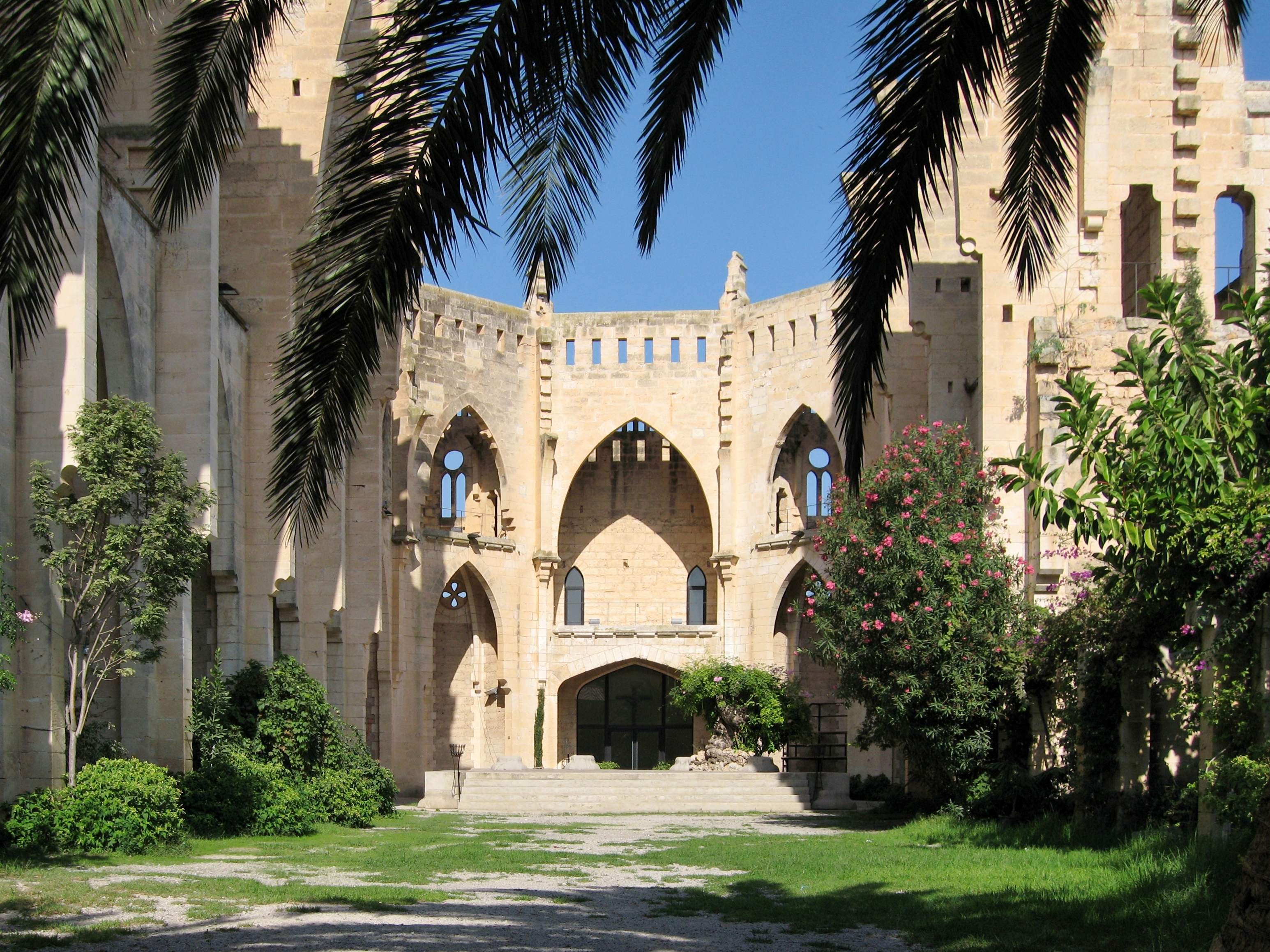 Unvollendete Kirche Església Nova in Son Servera, Mallorca, Spanien